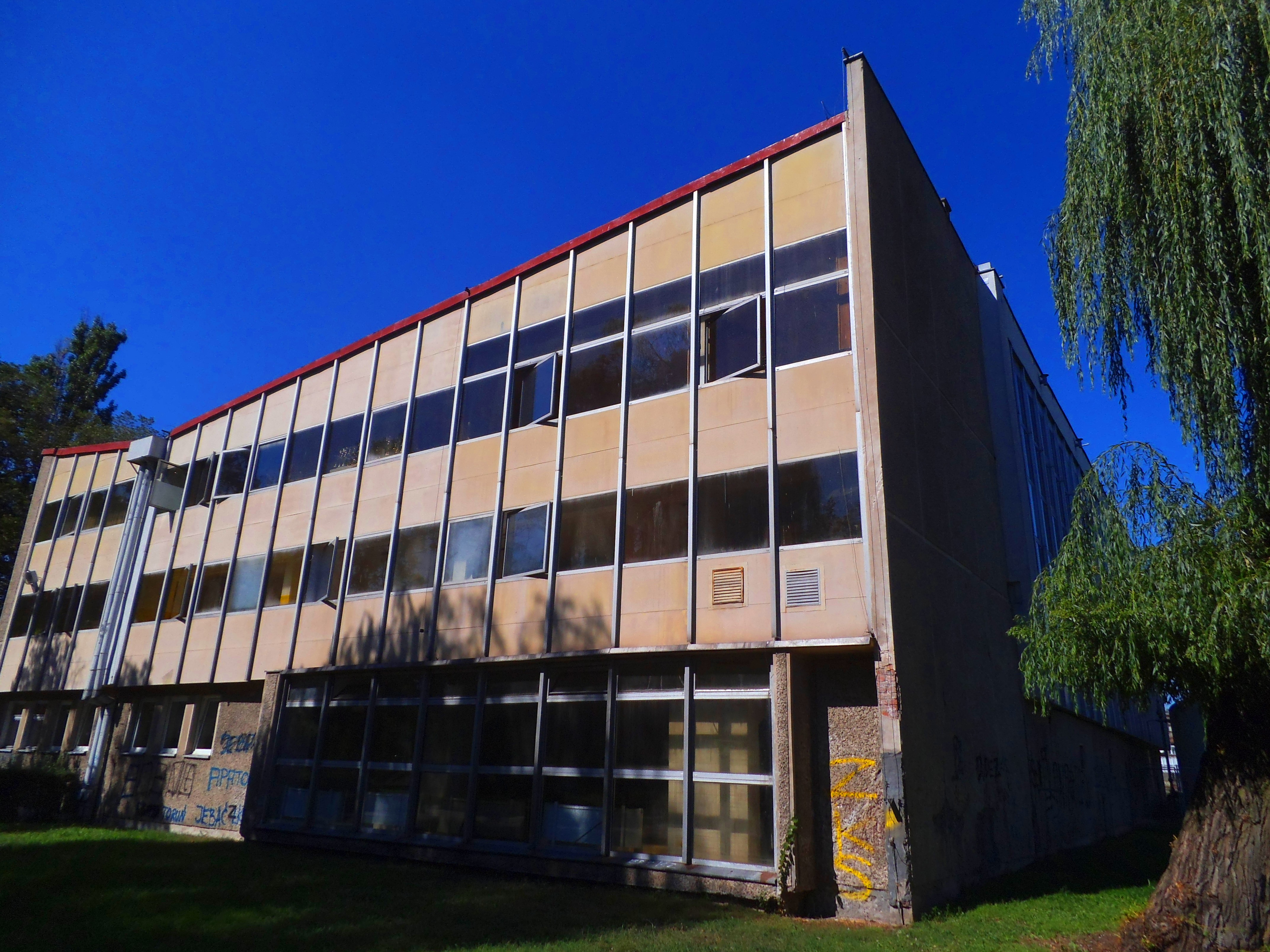 Basen pływacki w Toruniu